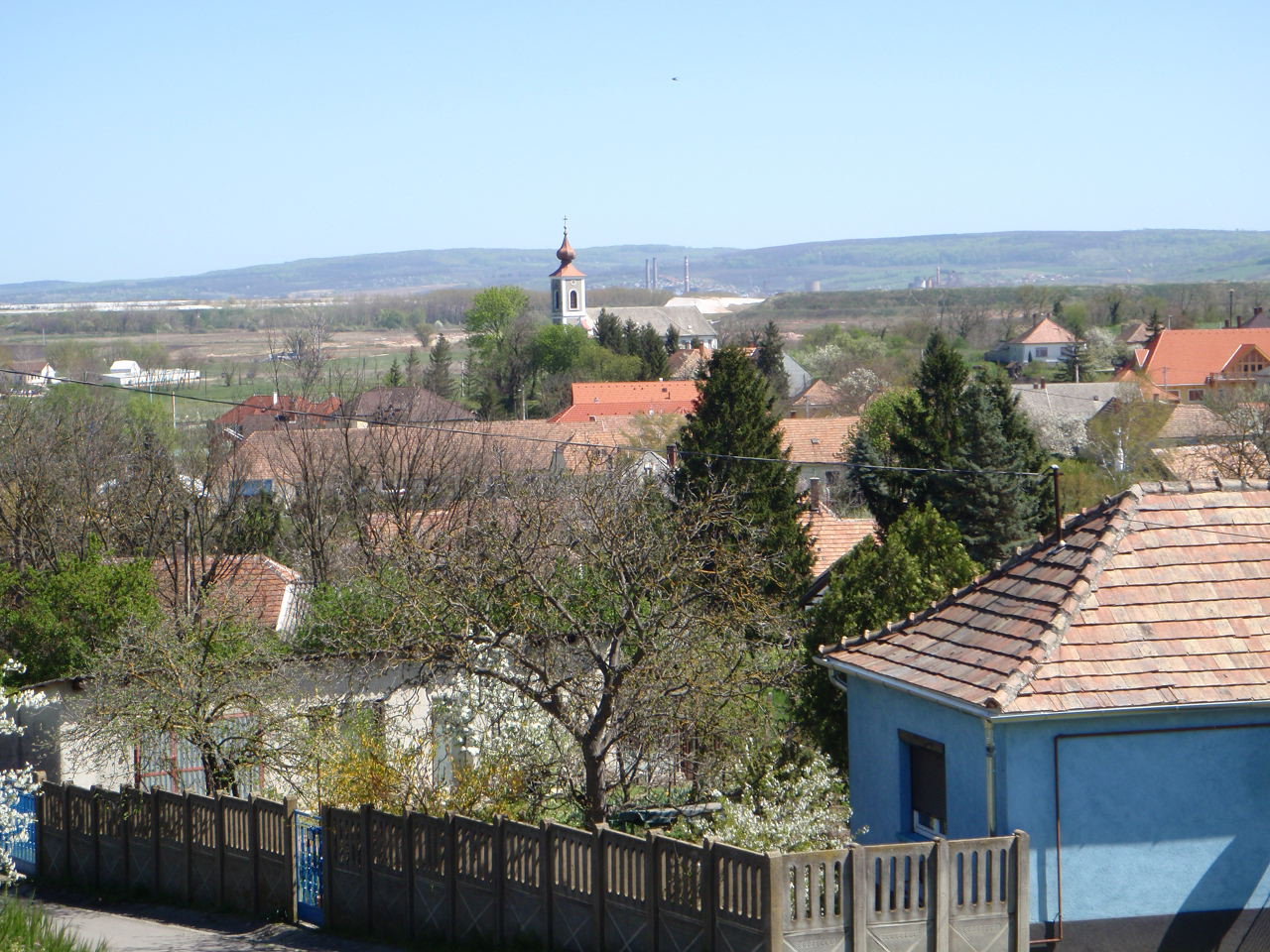 Kolontár látképe a Szabadság dombról